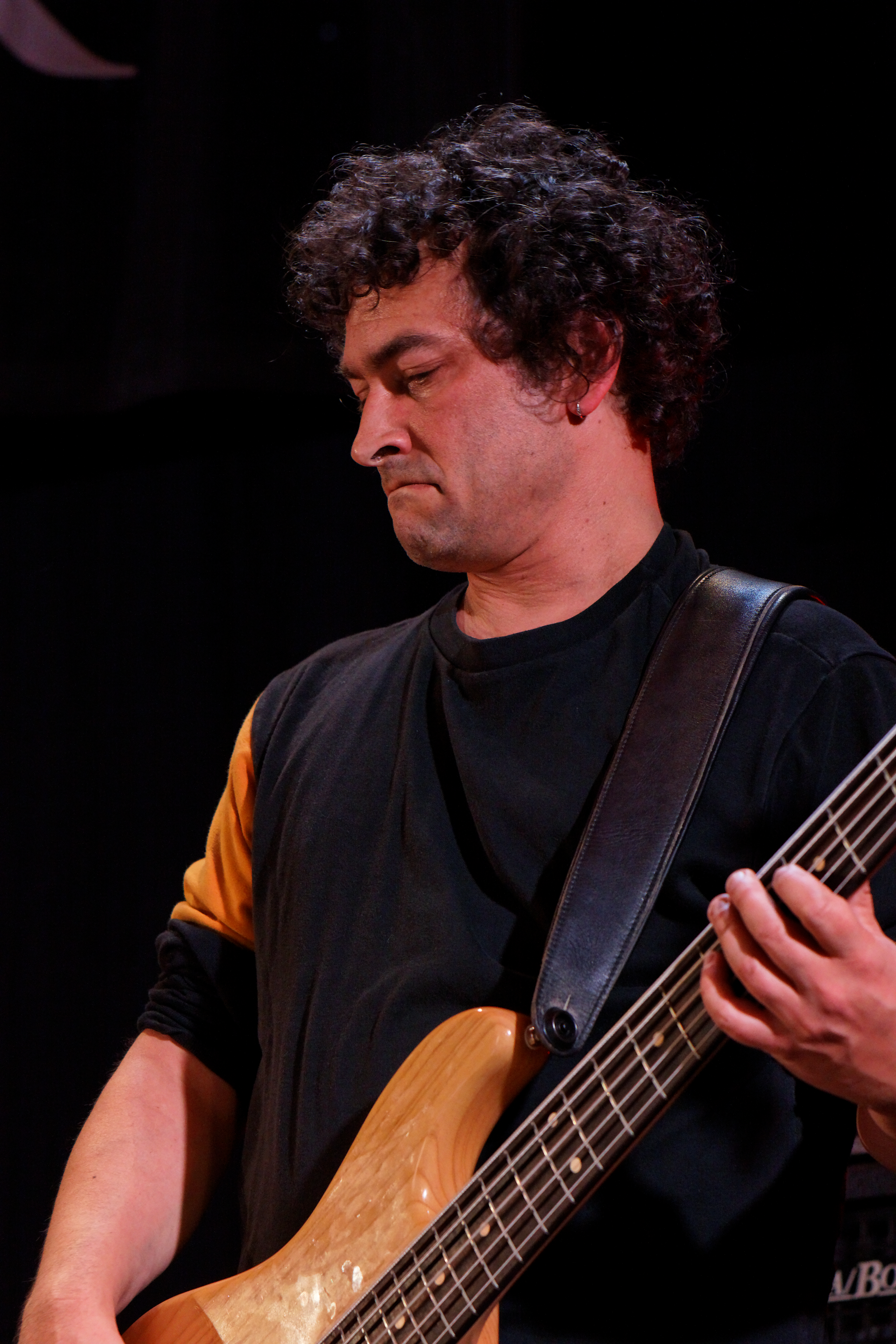 Stéphane de Vito en concert avec le groupe Hiks le 19 juillet lors du festival de Cornouaille 2011.